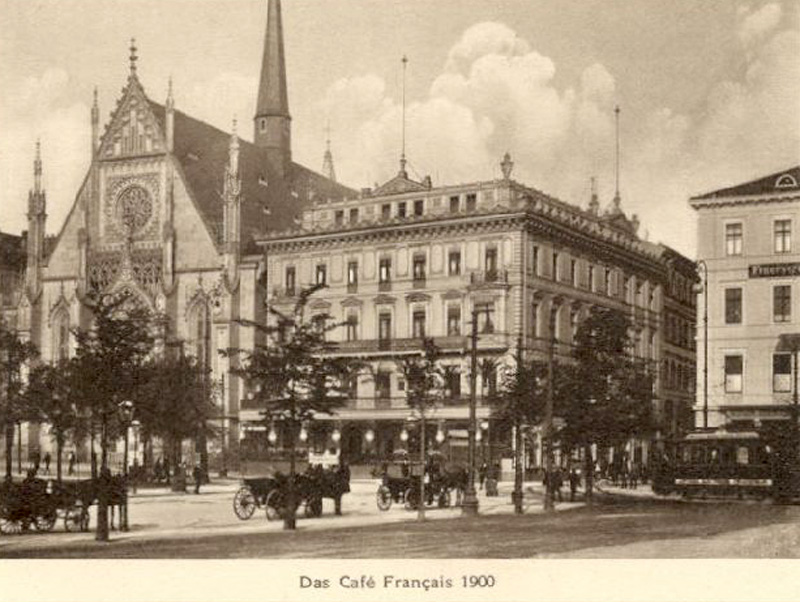 Café français in Leipzig um 1900